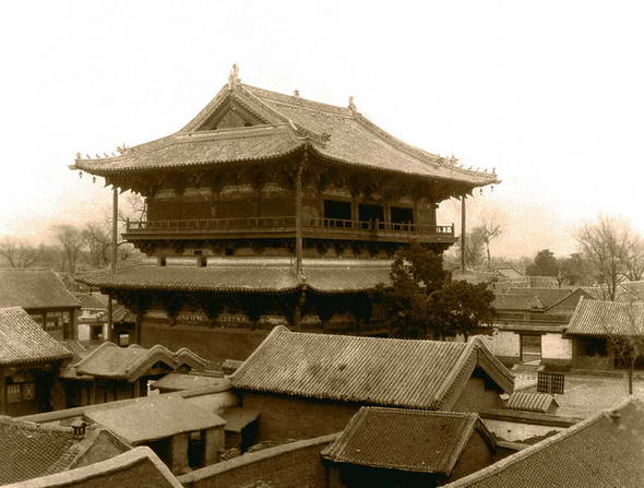 观音阁远望梁思成摄